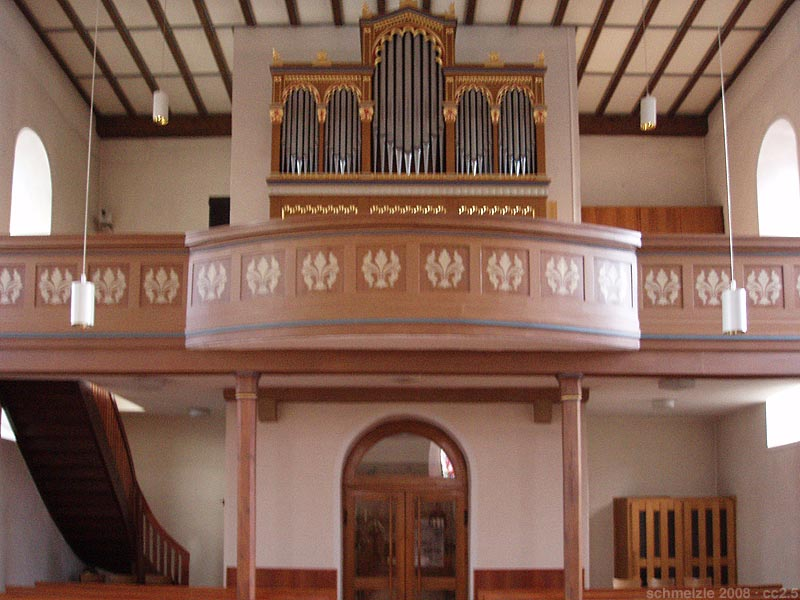 Katholische Kirche St. Georg in Siegelsbach, Orgelempore